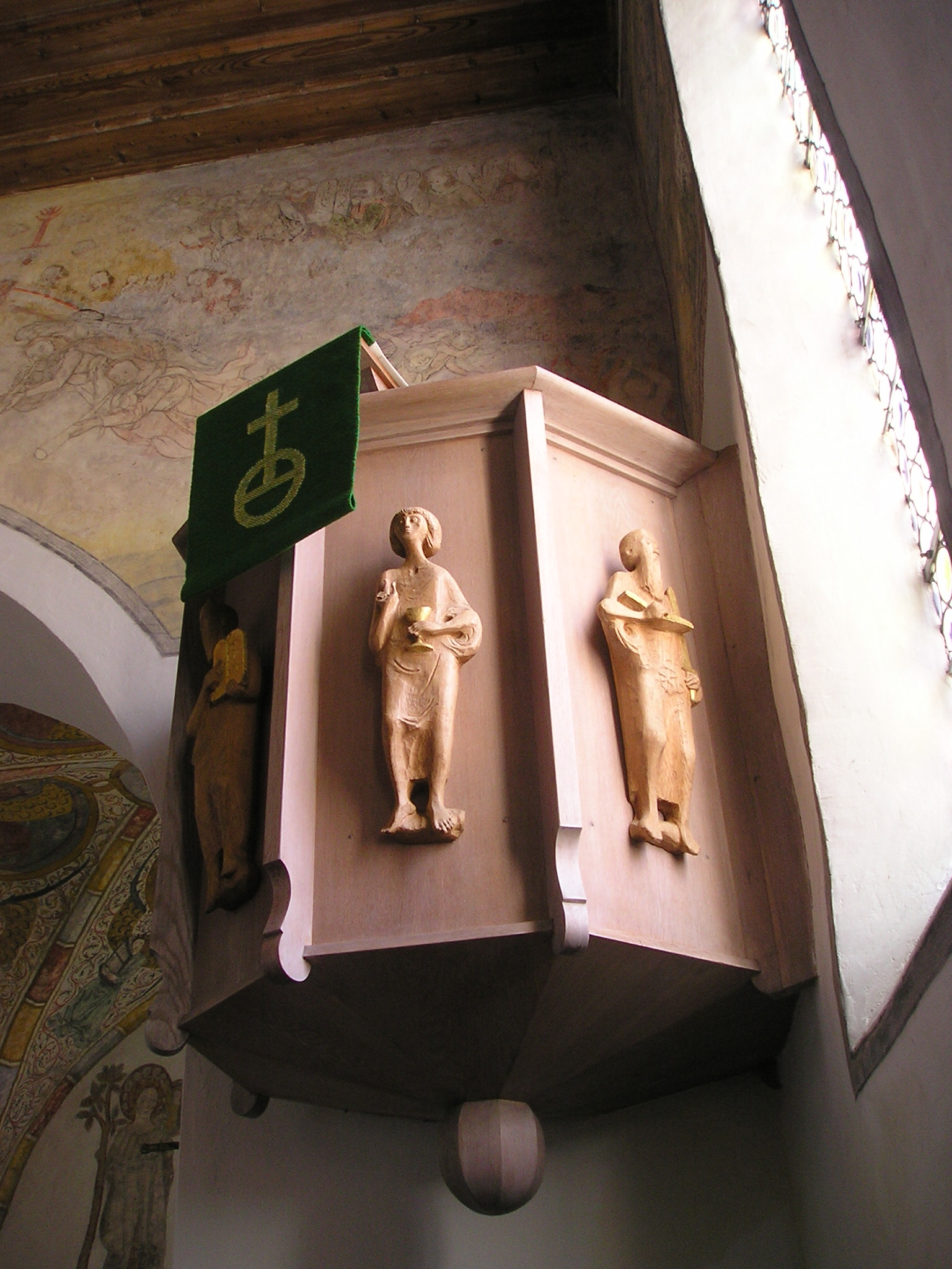 Bühl i. Ries, Gemeindeteil von Alerheim im Landkreis Donau-Ries (Bayern), Evang. St.-Marien-Kirche, Kanzel